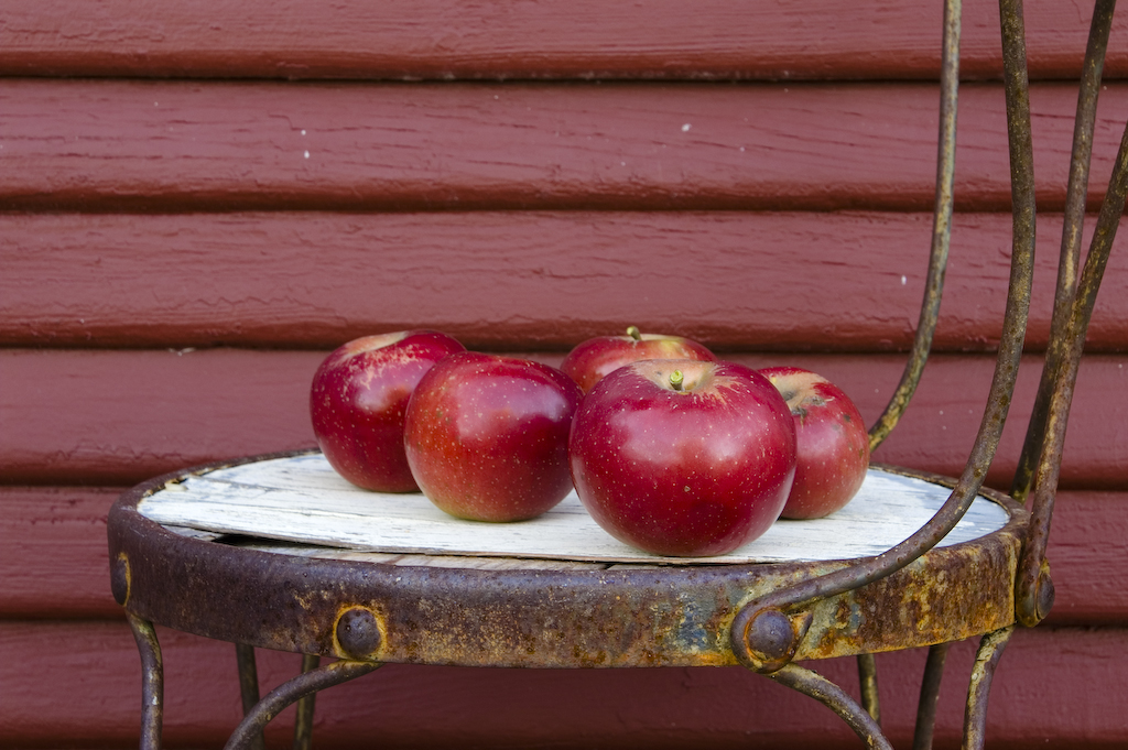 Ripe Arkansas Black apples.